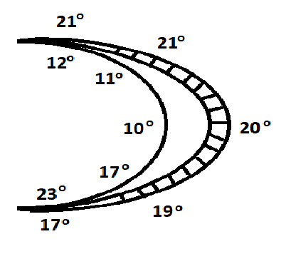 Przeciętne nachylenia zboczy wydm parabolicznych na terenie Polski wg L. Kadara.